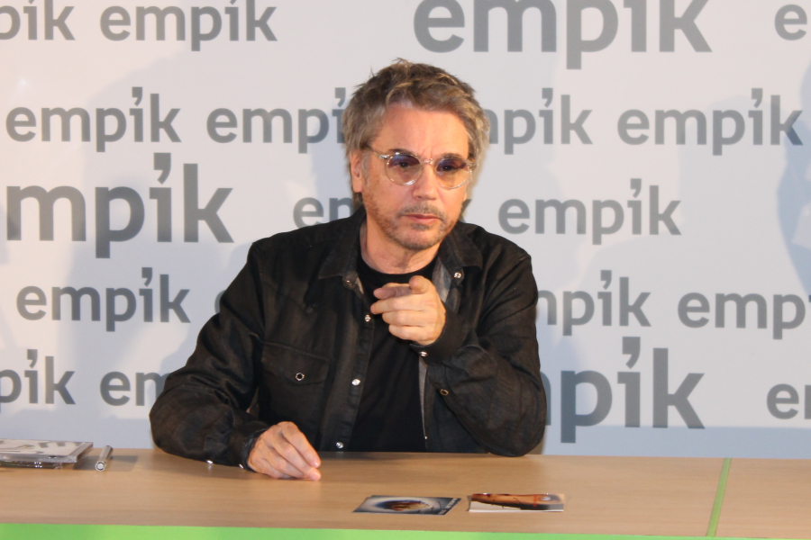 Jean-Michel Jarre podczas spotkania autorskiego zorganizowanego 21 października 2015 na II piętrze salonu Empik w Domu Handlowym Junior przy ul. Marszałkowskiej 116/122 w Warszawie w celu promocji albumu Electronica 1: The Time Machine wydanego 16 października 2015.